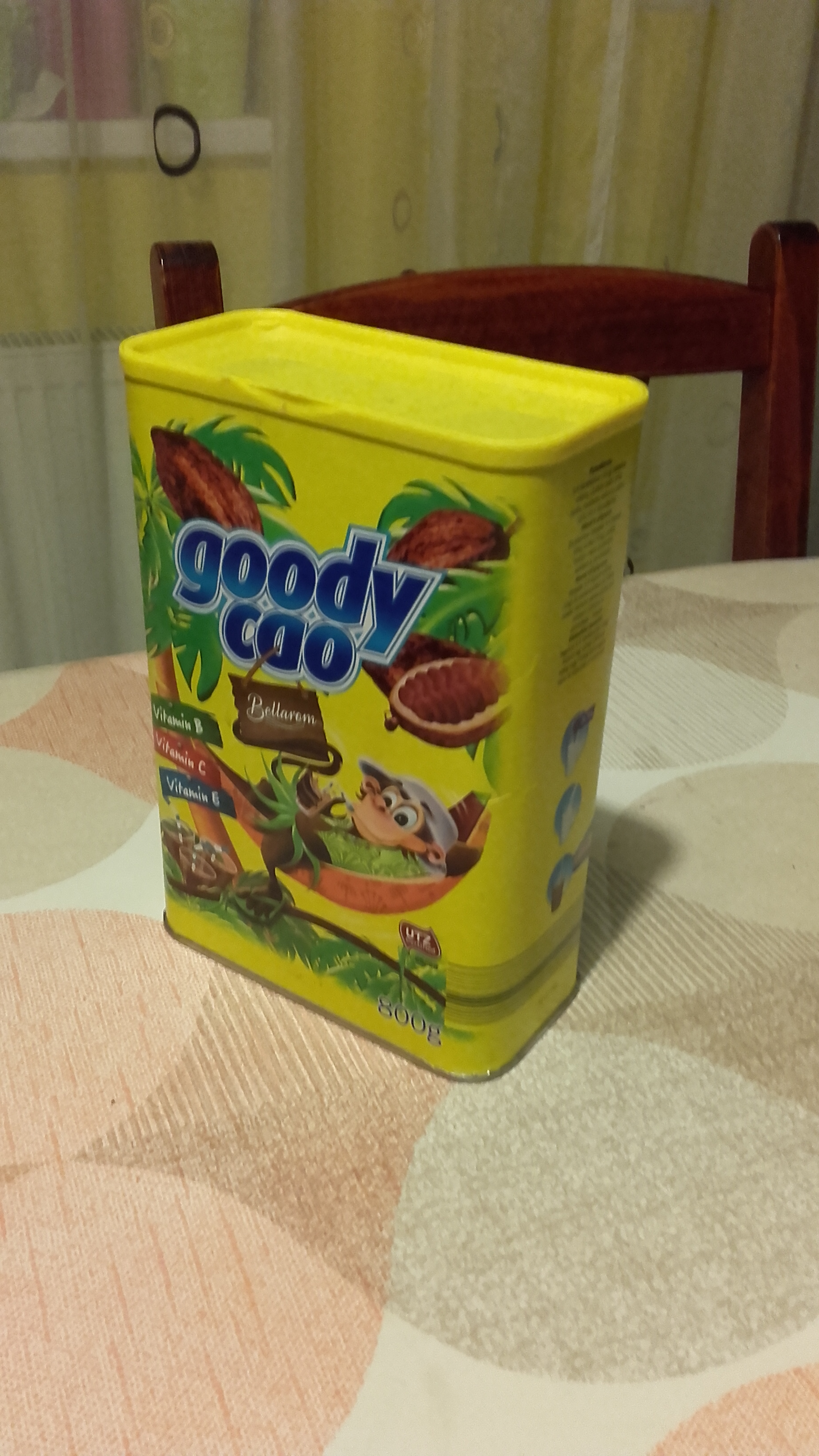 Egy hagyományos háztartásban megtalálható kakaó italpor